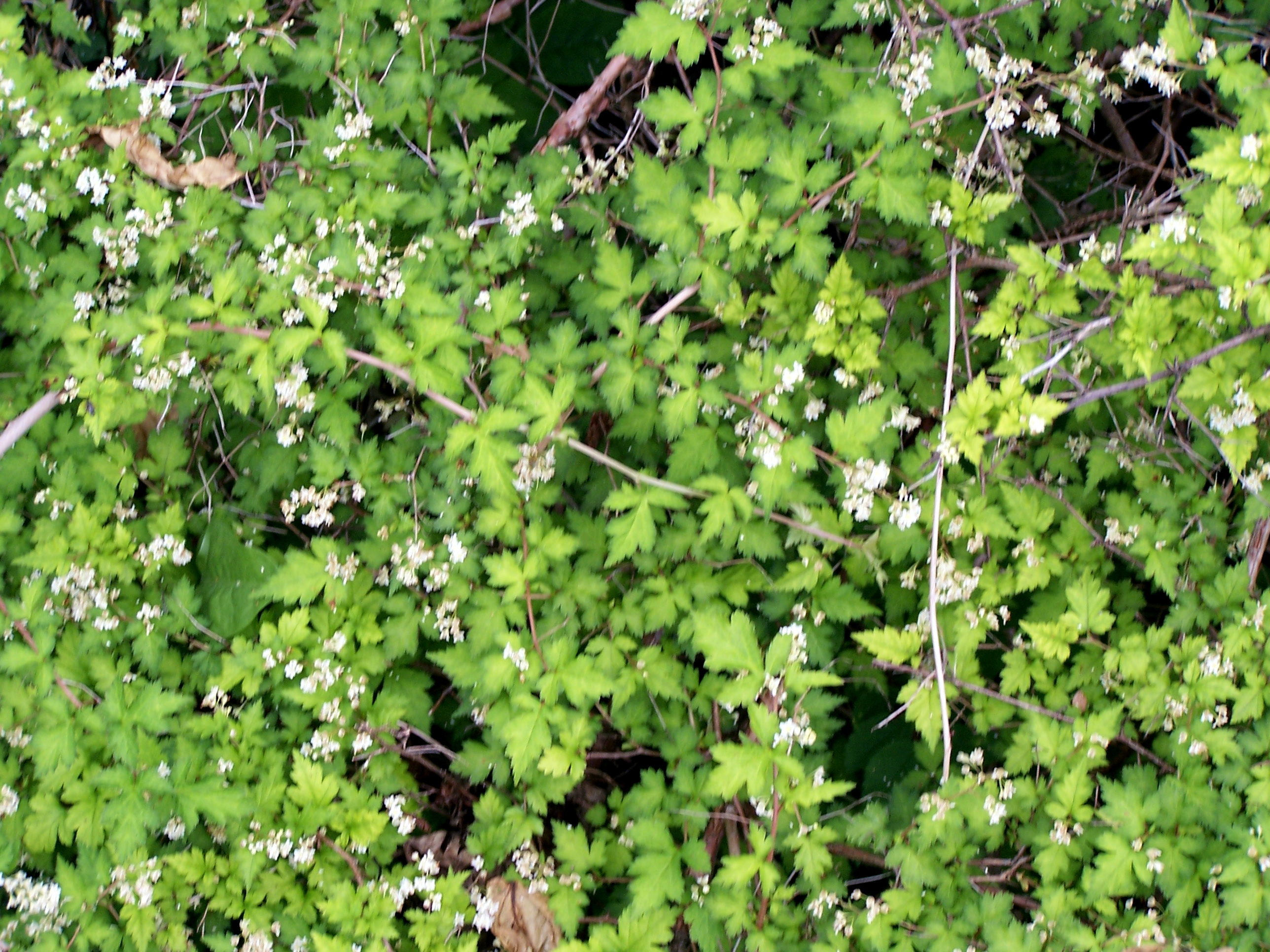 Stephanandra incisa 17 juin 2006 Vieux jardin botanique de Göttingen